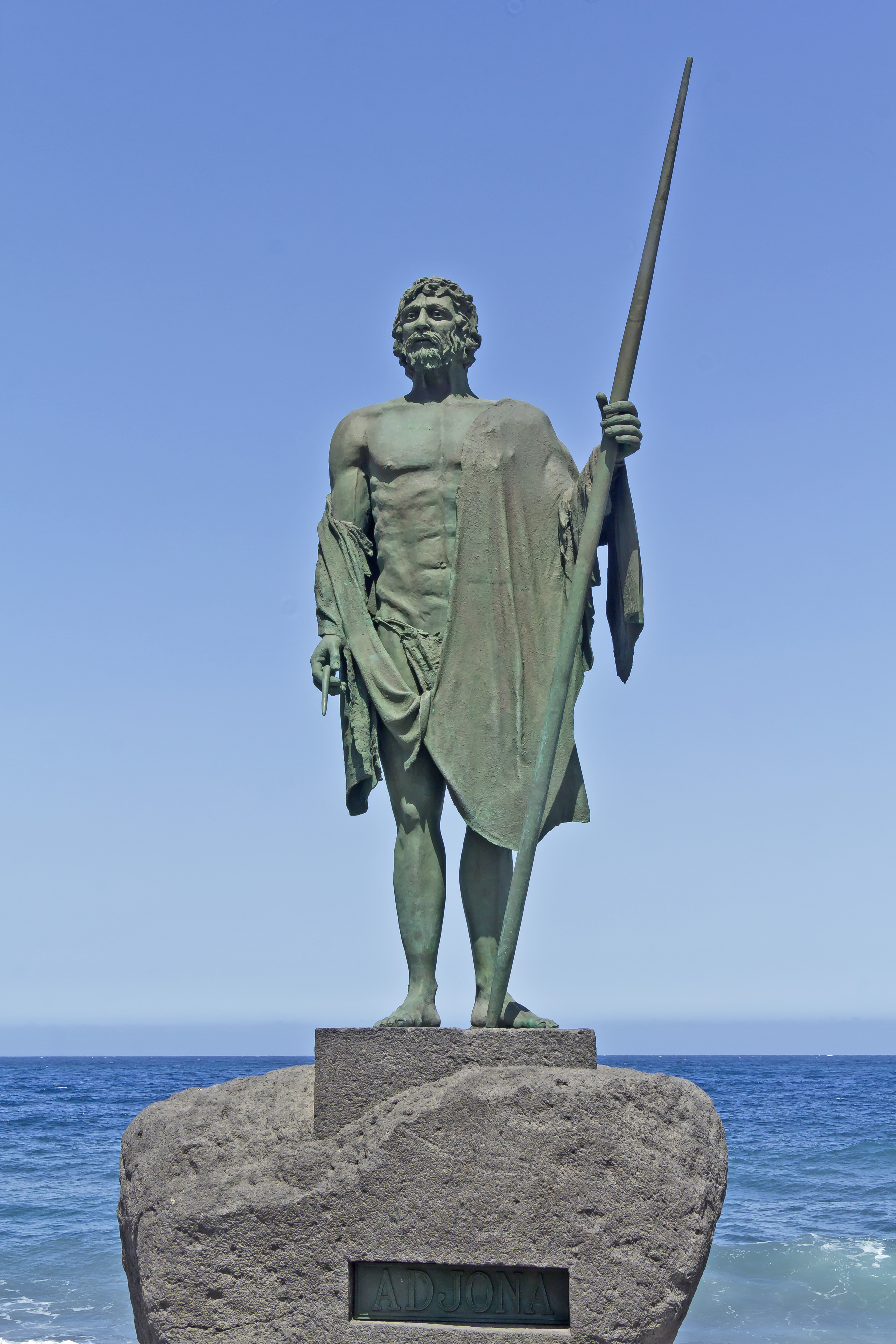 Die Plastik des Mencey Adjona auf der Plaza de la Patrona de Canarias in Candelaria, Teneriffa, Spanien wurde von José Abad geschaffen.